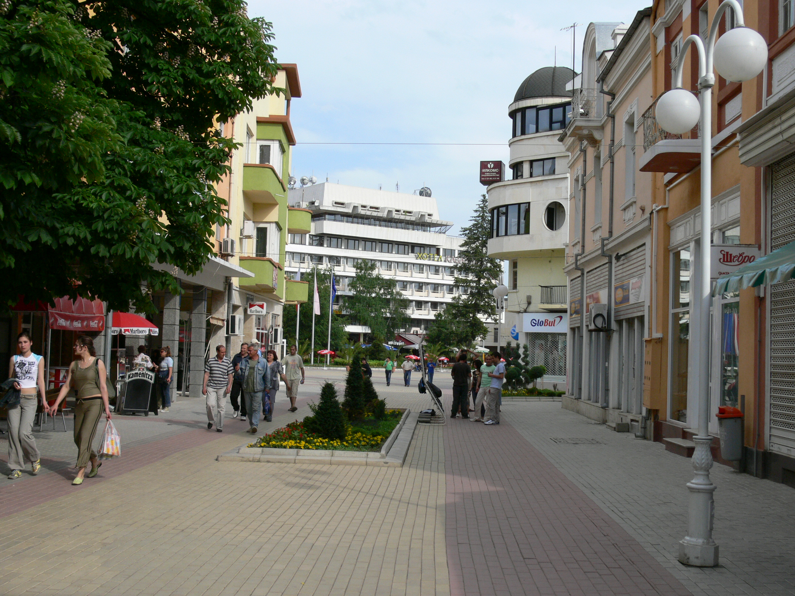 Kazanlak, Bulgaria